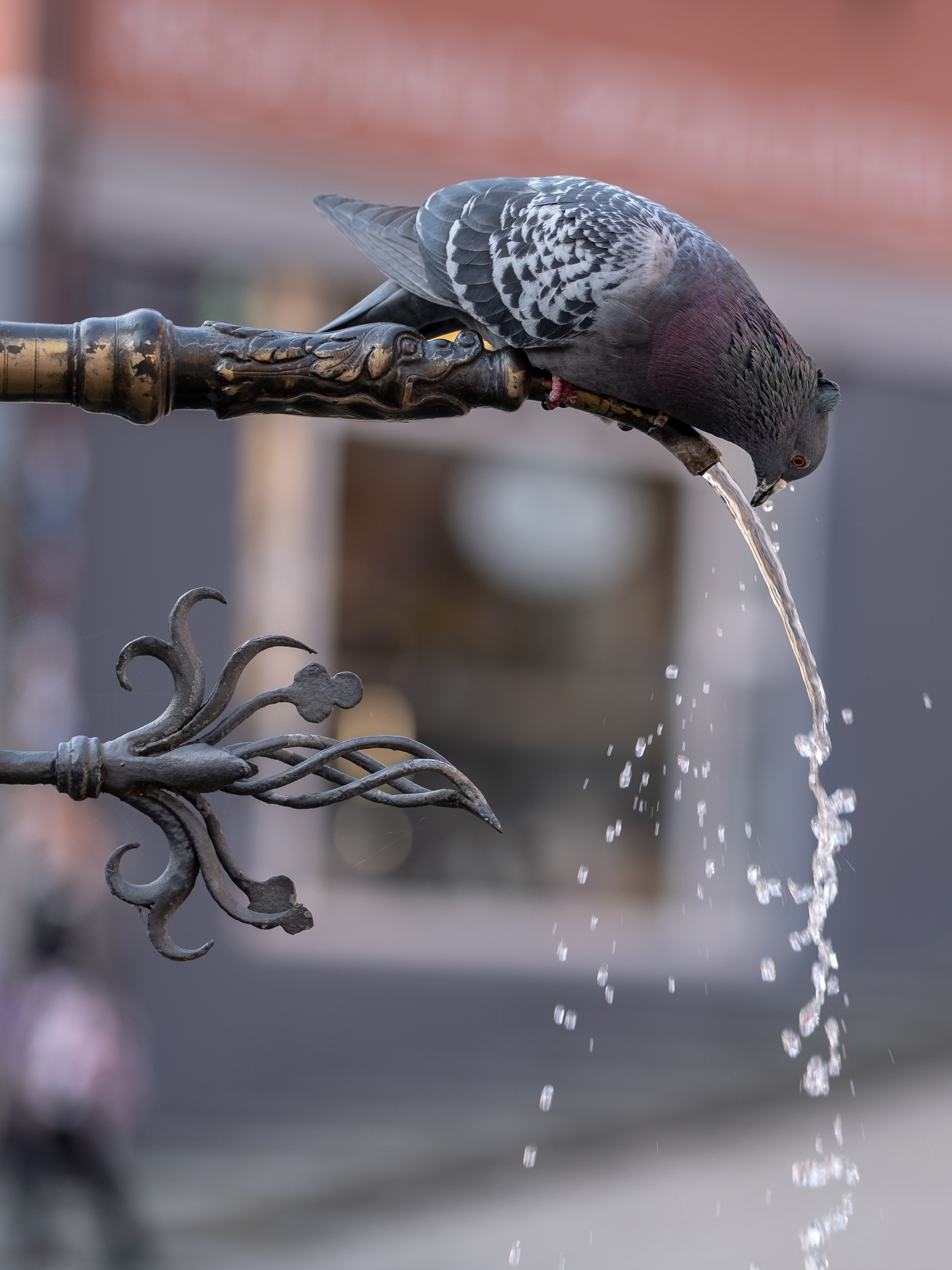 Trinkende Taube am Neptunbrunnen in Tübingen